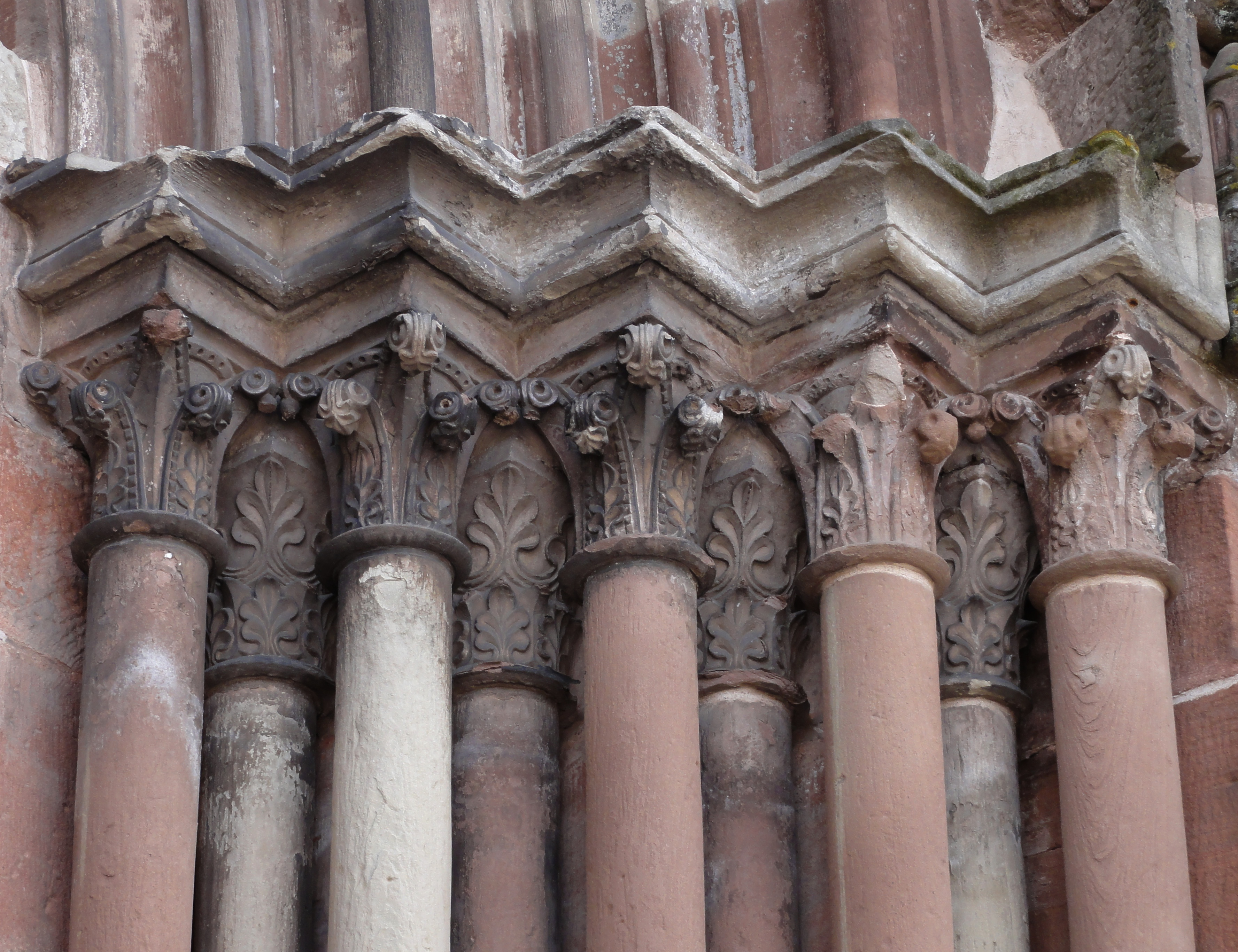 Alsace, Bas-Rhin, Neuwiller-lès-Saverne, Église abbatiale Saints-Pierre et Paul (PA00084820, IA67009917. Portail de la nef nord dit "Porte des morts" (XIIIe)